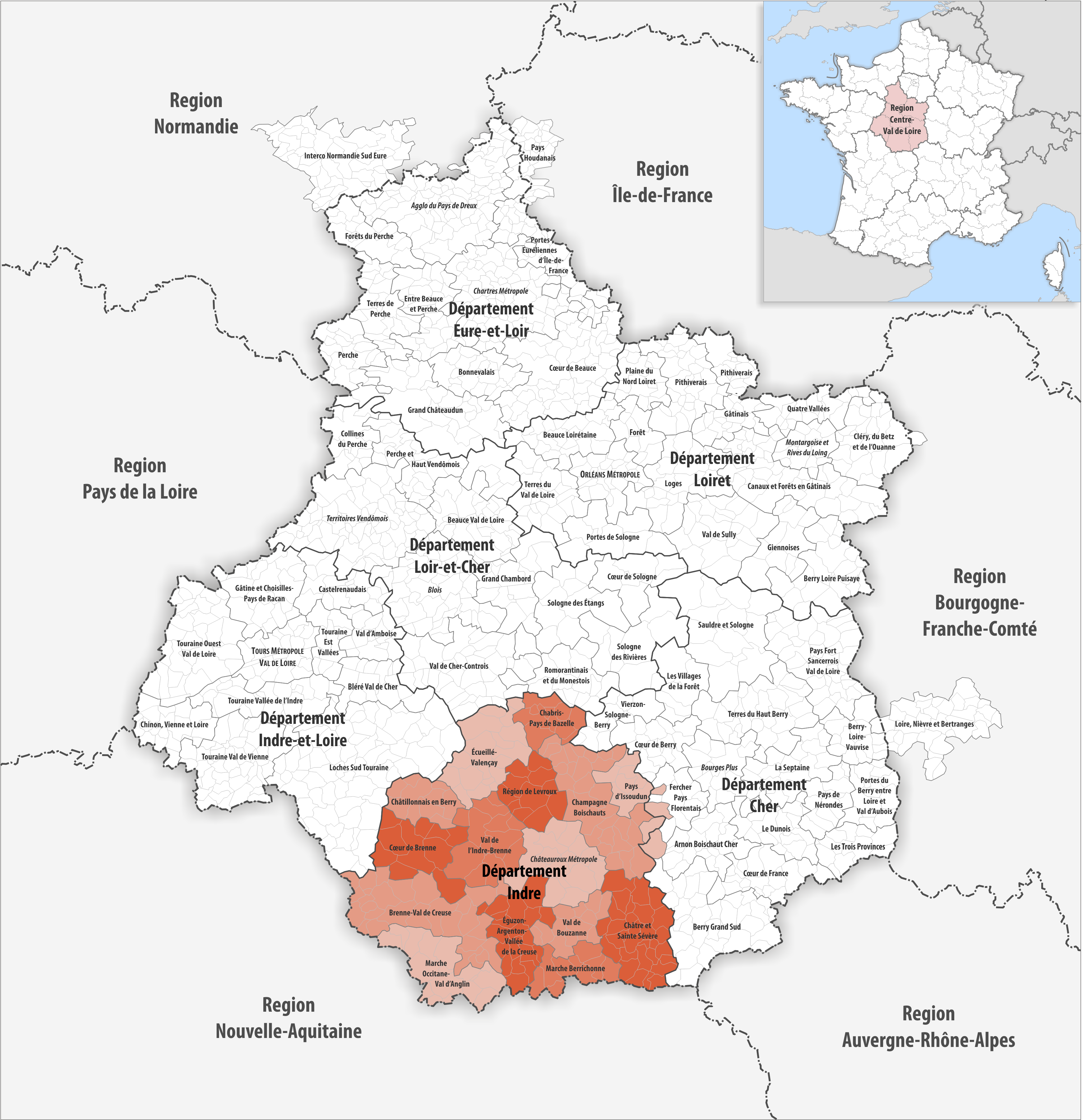 Gemeindeverbände im Département Indre